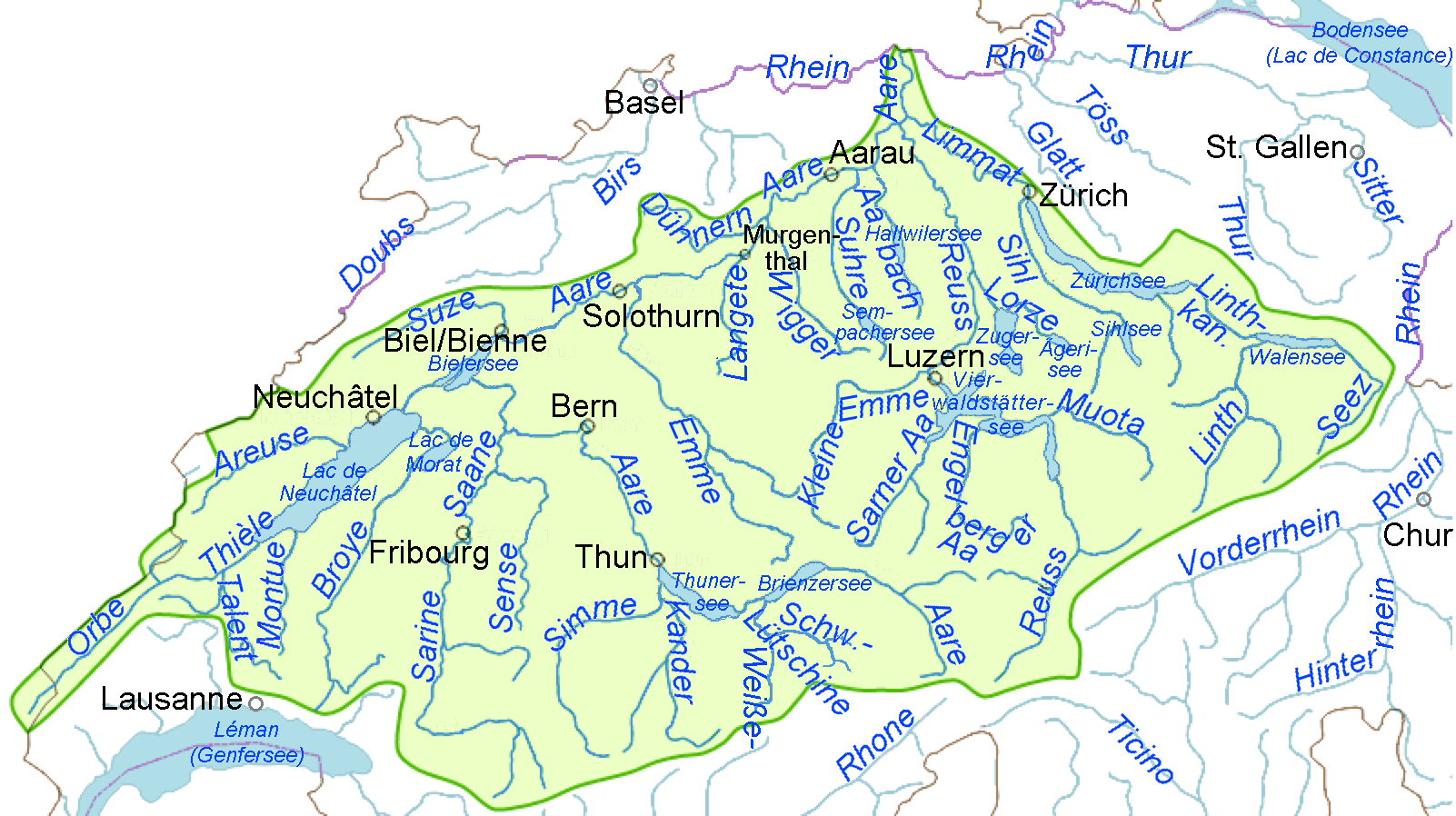 Flusseinzugsgebiet der Aare